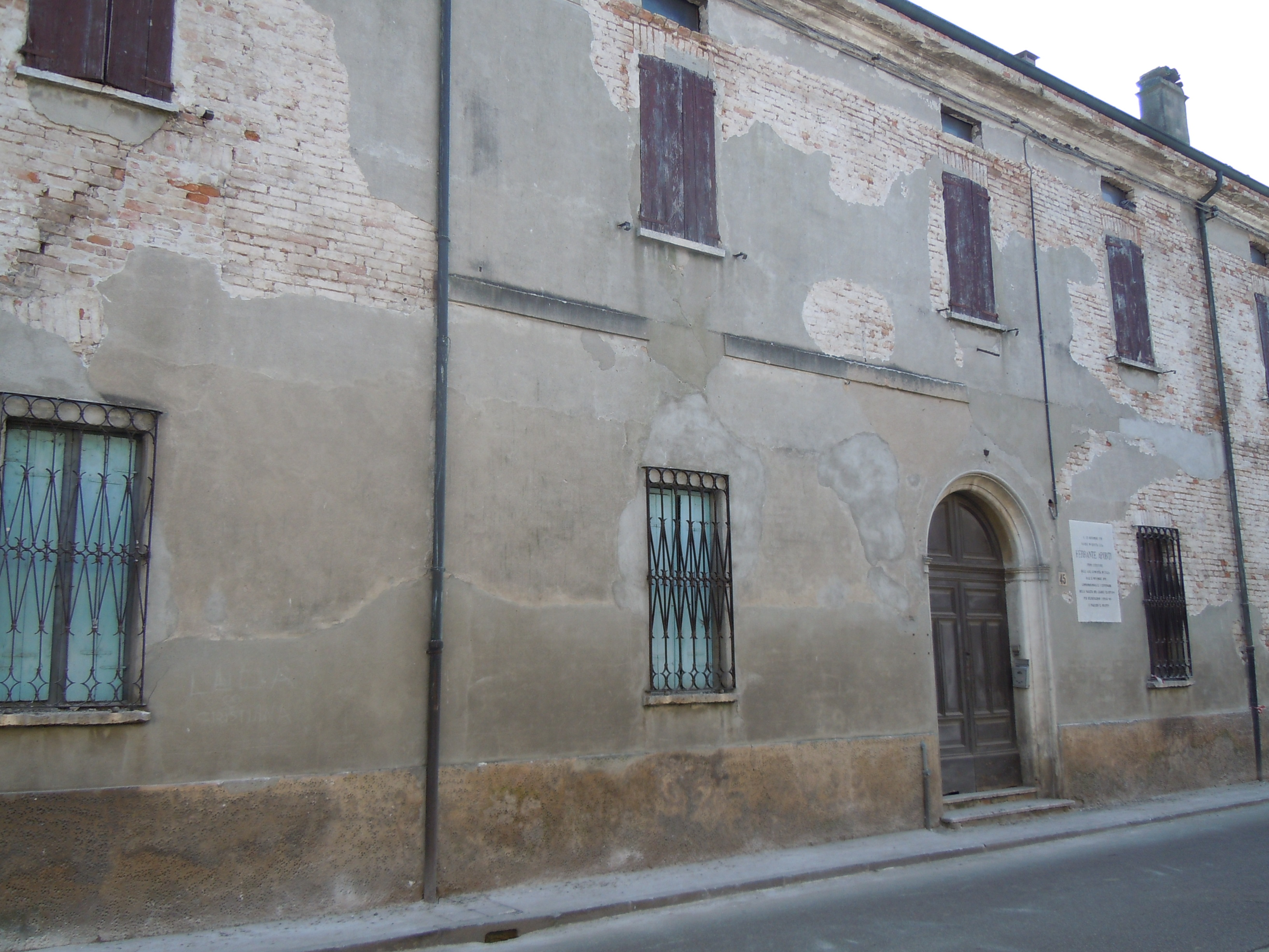 San Martino dall'Argine, casa natale di Ferrante Aporti.